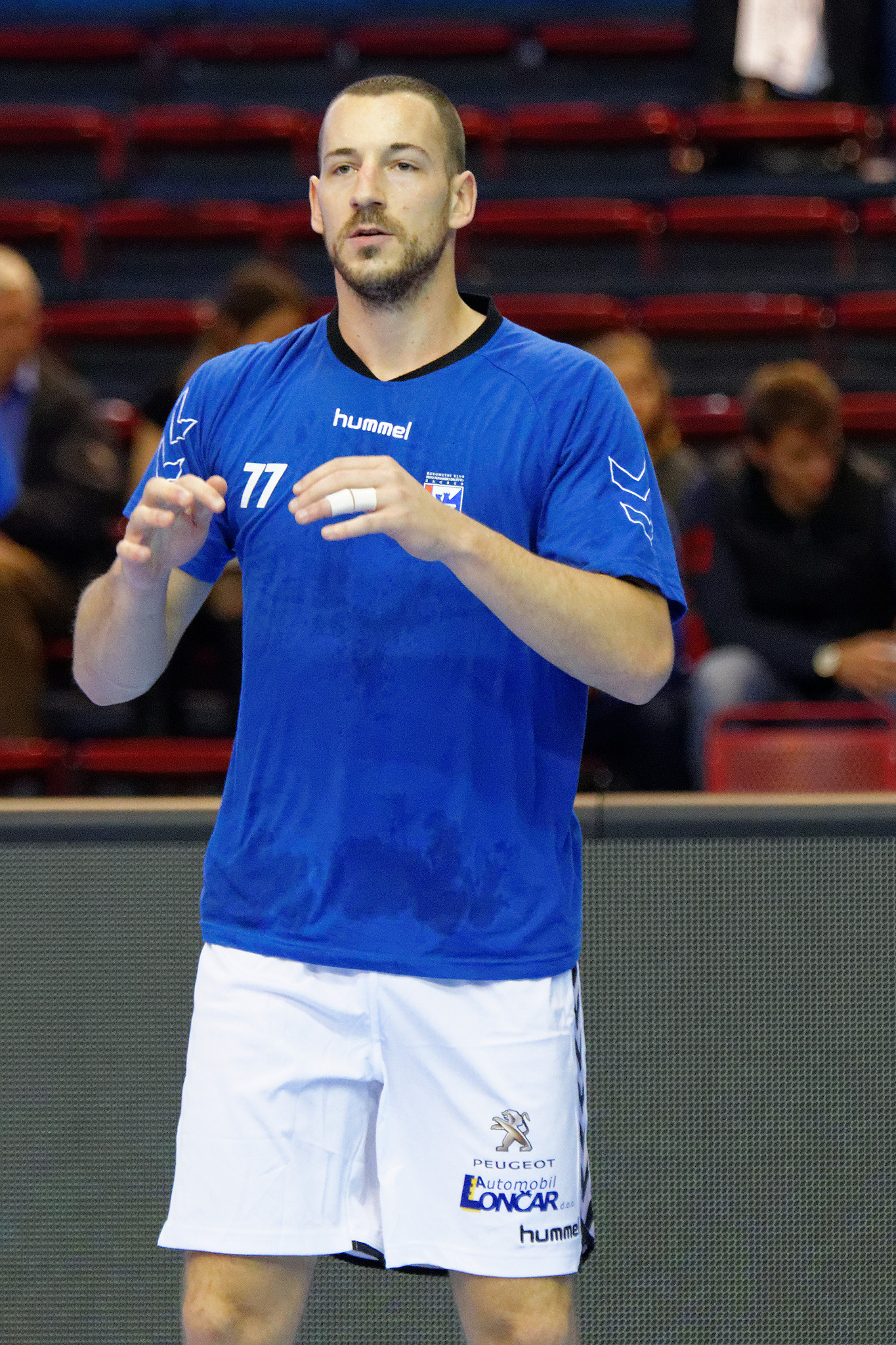 Rencontre de phase de groupe de la ligue des champions 2015-16 entre le PSG et le RK Zagreb. A la Halle Carpentier (Paris), le 11 ocotbre 2015.